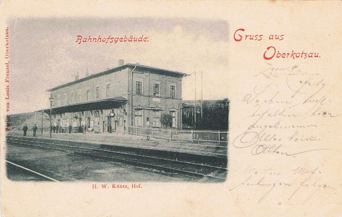 Ansichtskarte mit dem Bahnhof Oberkotzau